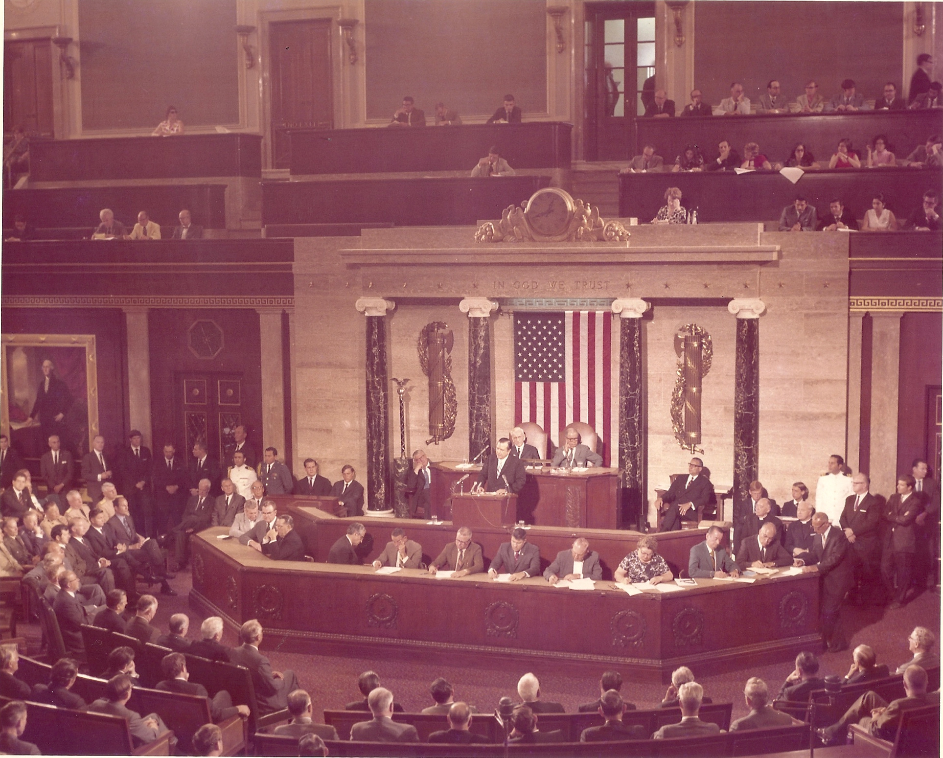 Rafael Caldera durante su discurso ante el pleno del Congreso de los Estados Unidos.